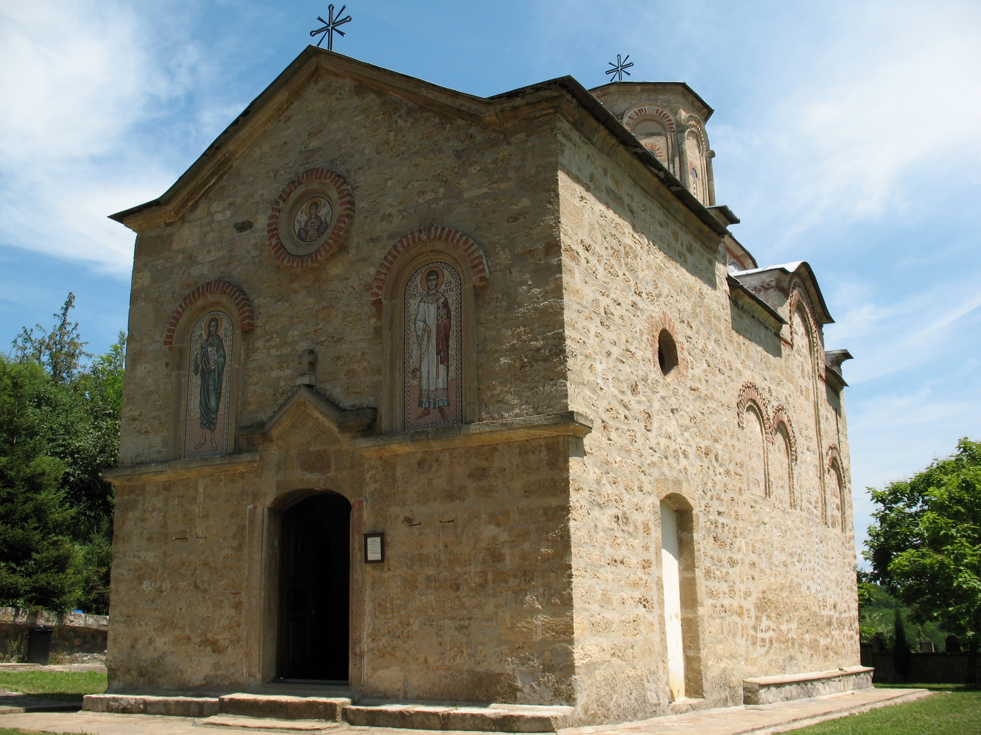 Саграђен 1402.